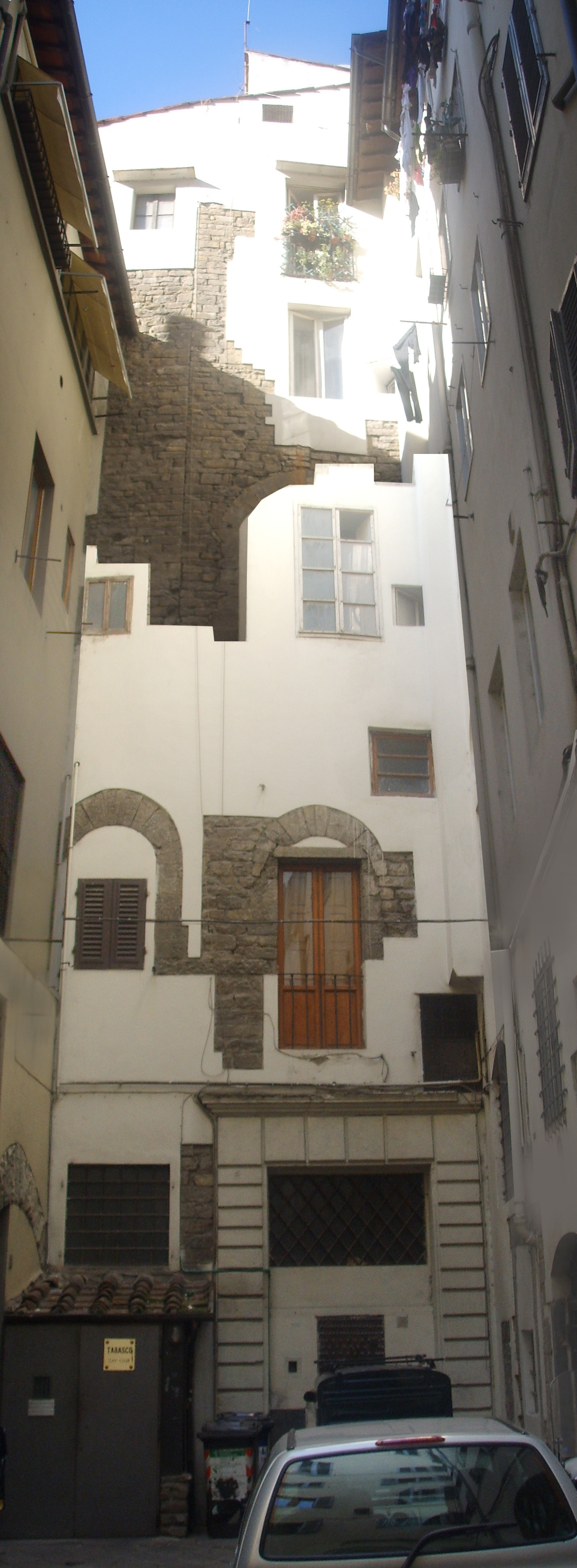 Torre_dei ciacchi in Florence, italy